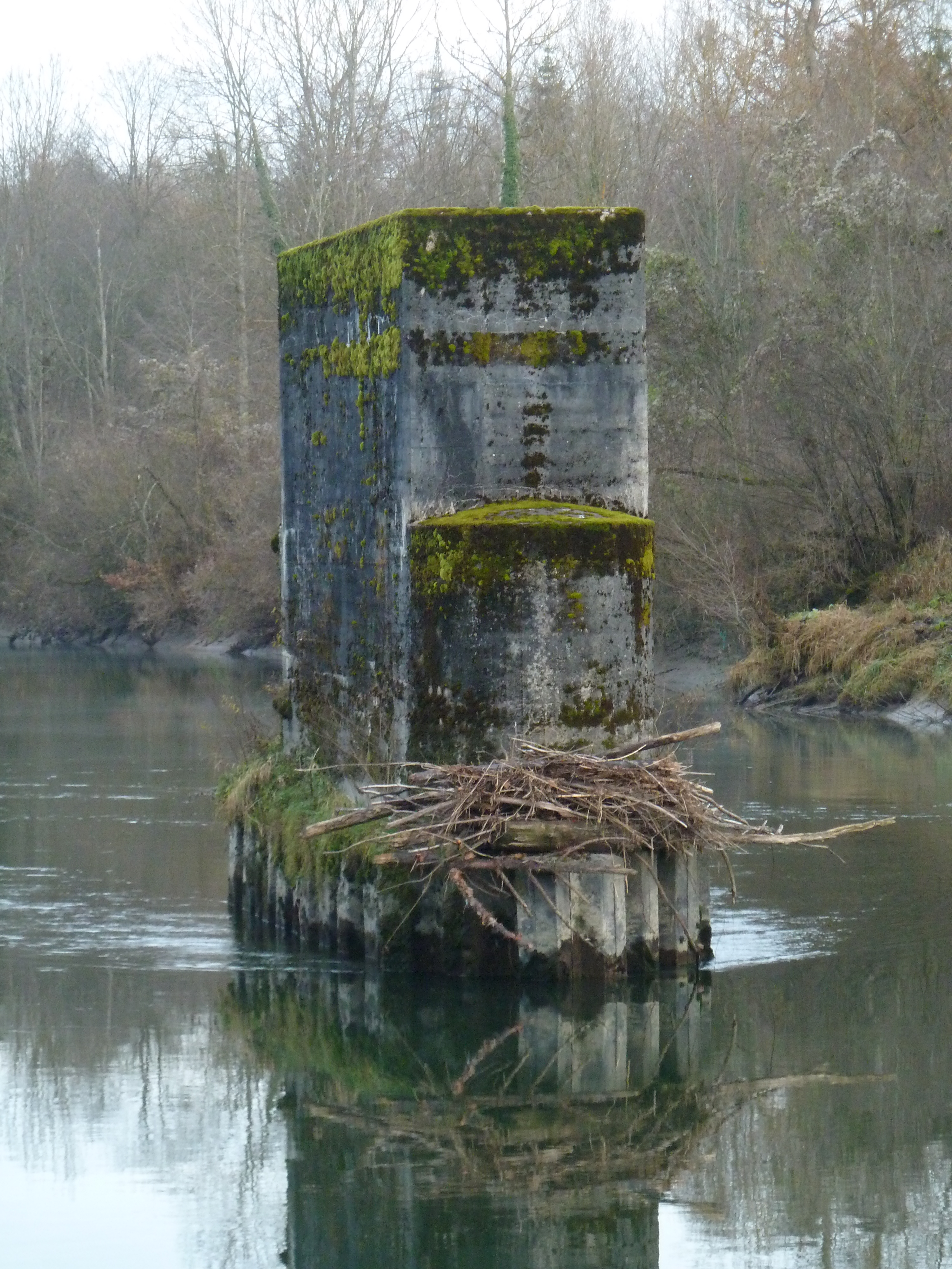 Nach der Stilllegung der Isartalbahn wurde die Brücke bei Penzberg abgebaut. Lediglich die Betonpfeiler in der Loisach blieben stehen.